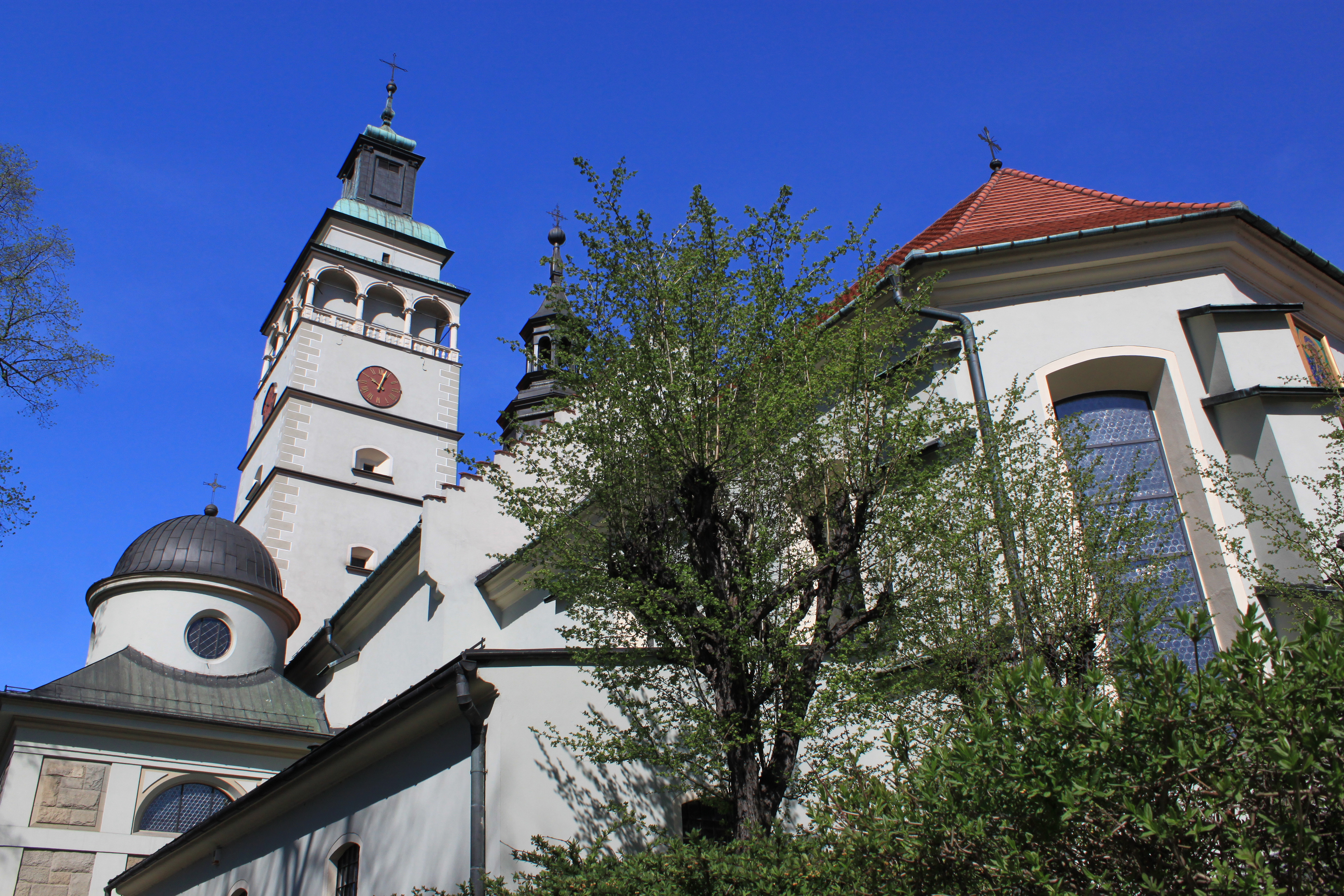 Żywiec, zespół kościoła par. pw. Narodzenia NMP, 1 poł. XV - XIX